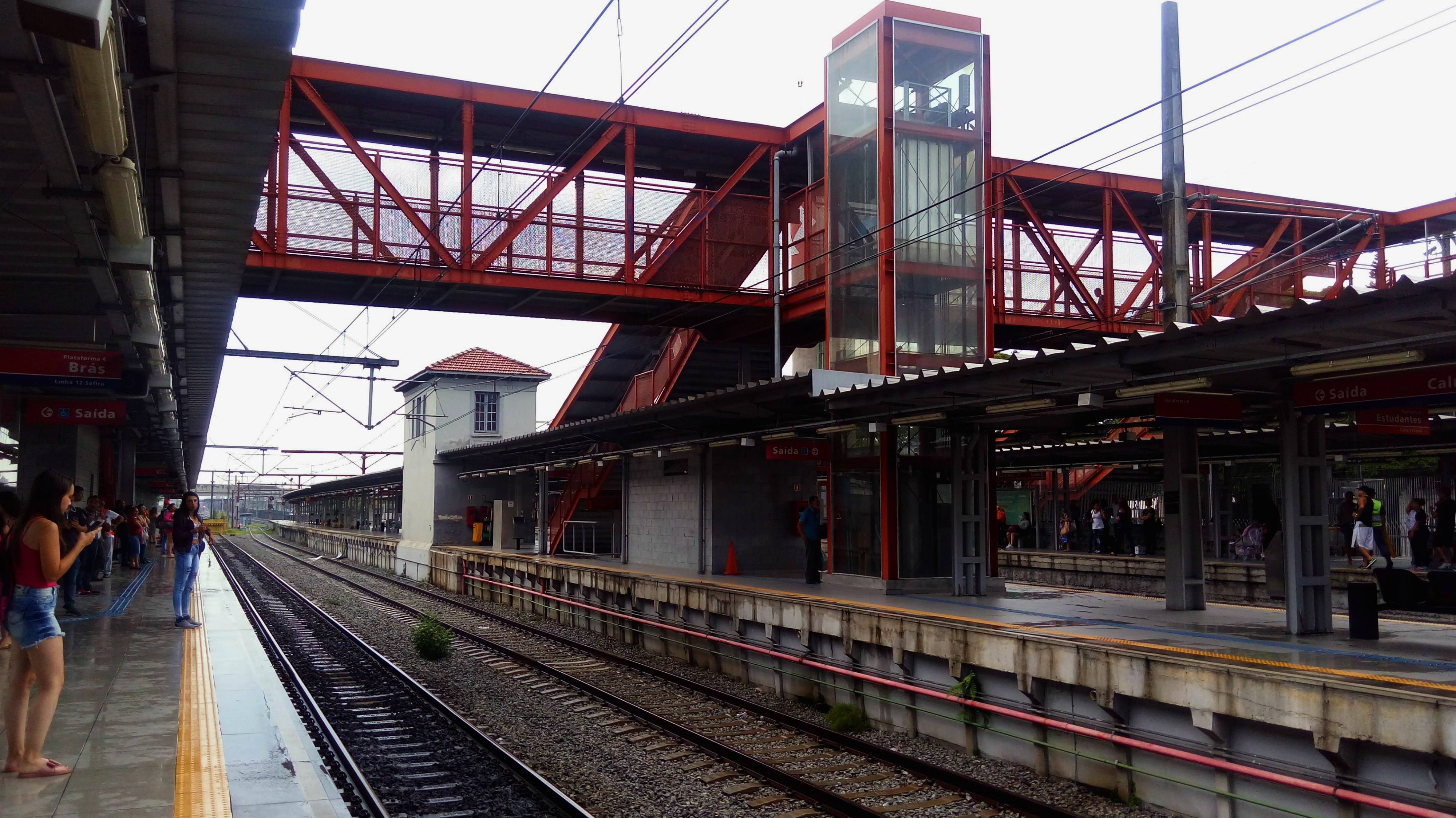 Estação Calmon Viana da CPTM.